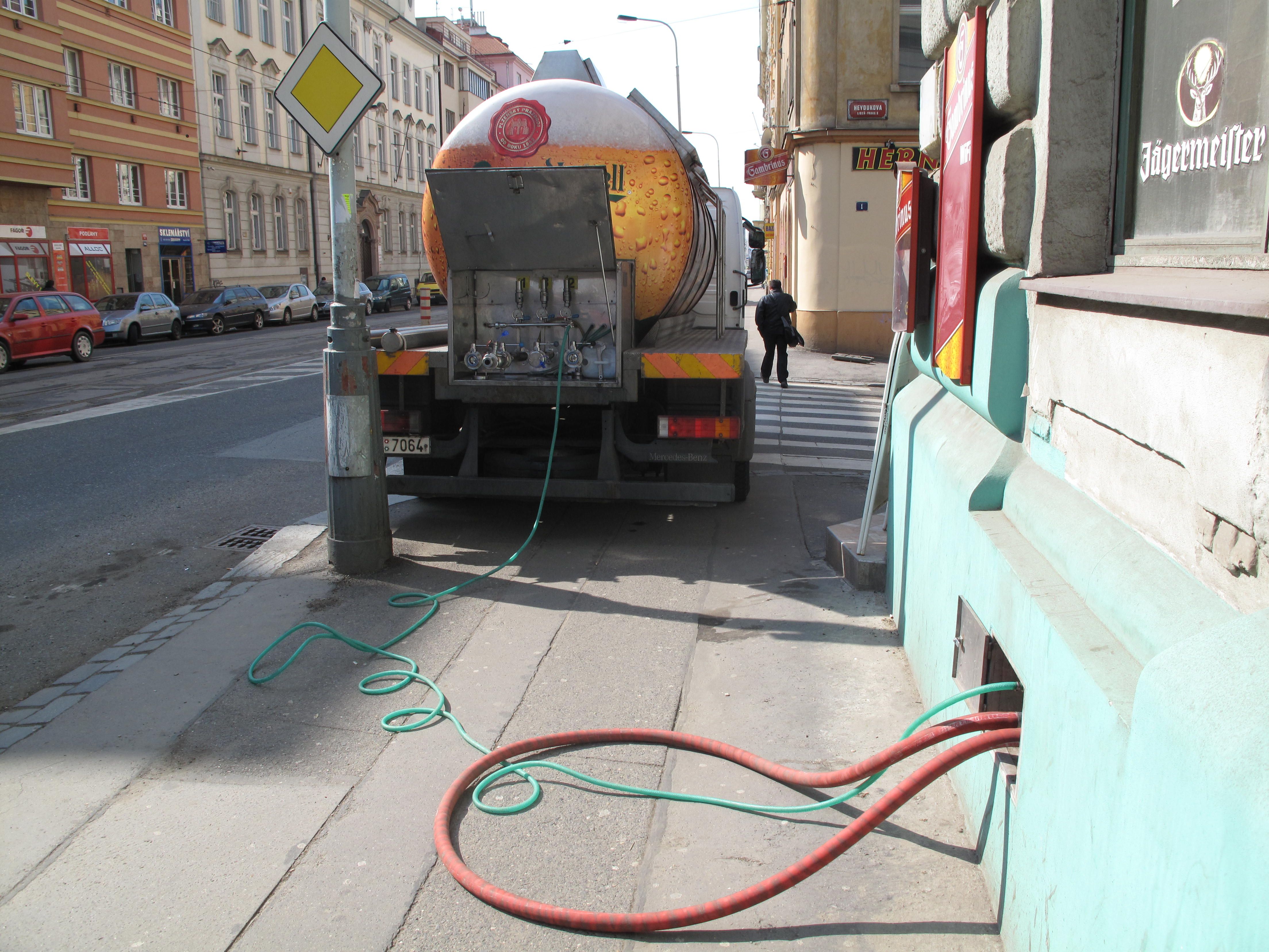 Cisterna plzeňského piva